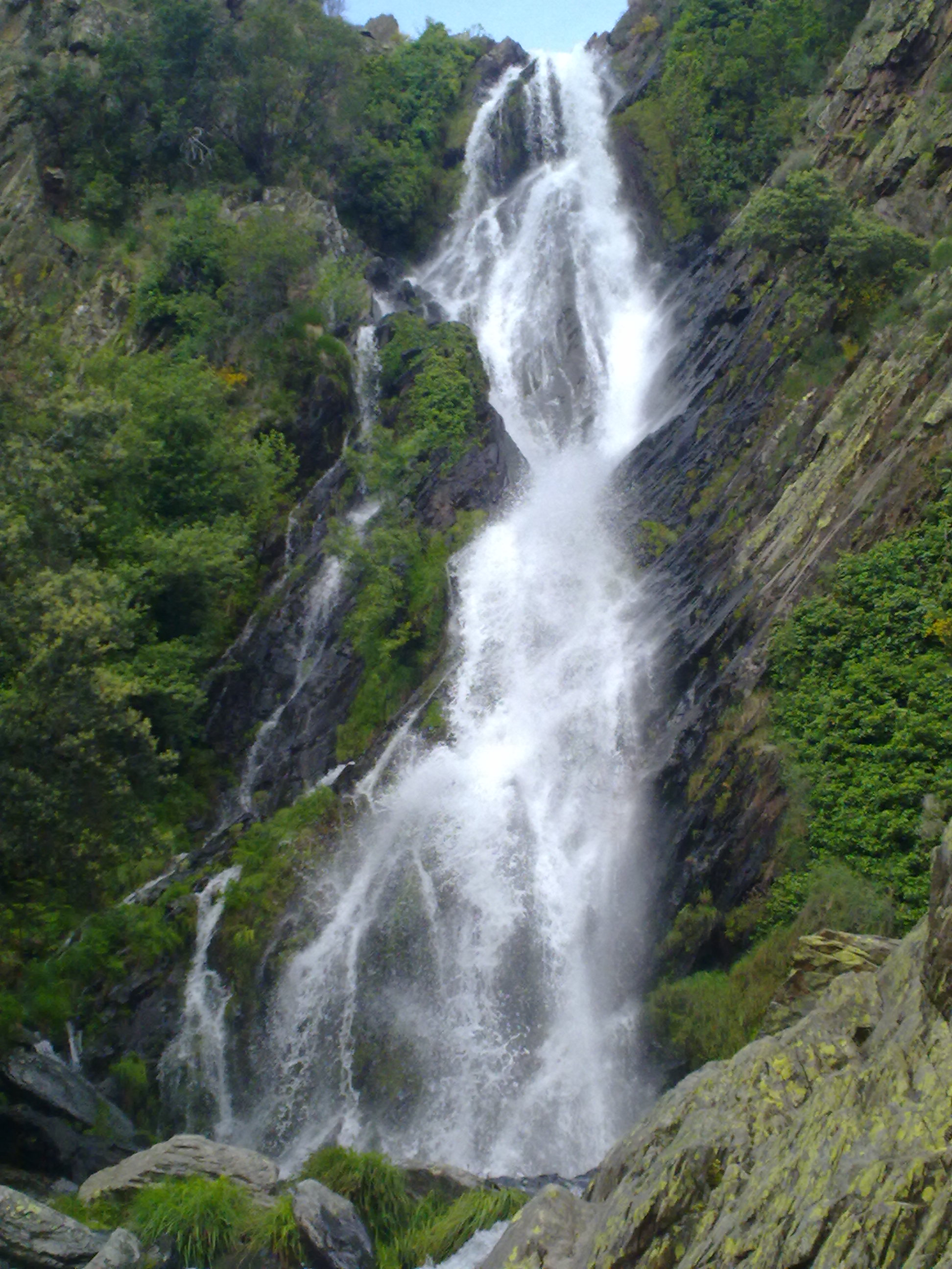 salto de agua el chorritero en ovejuela